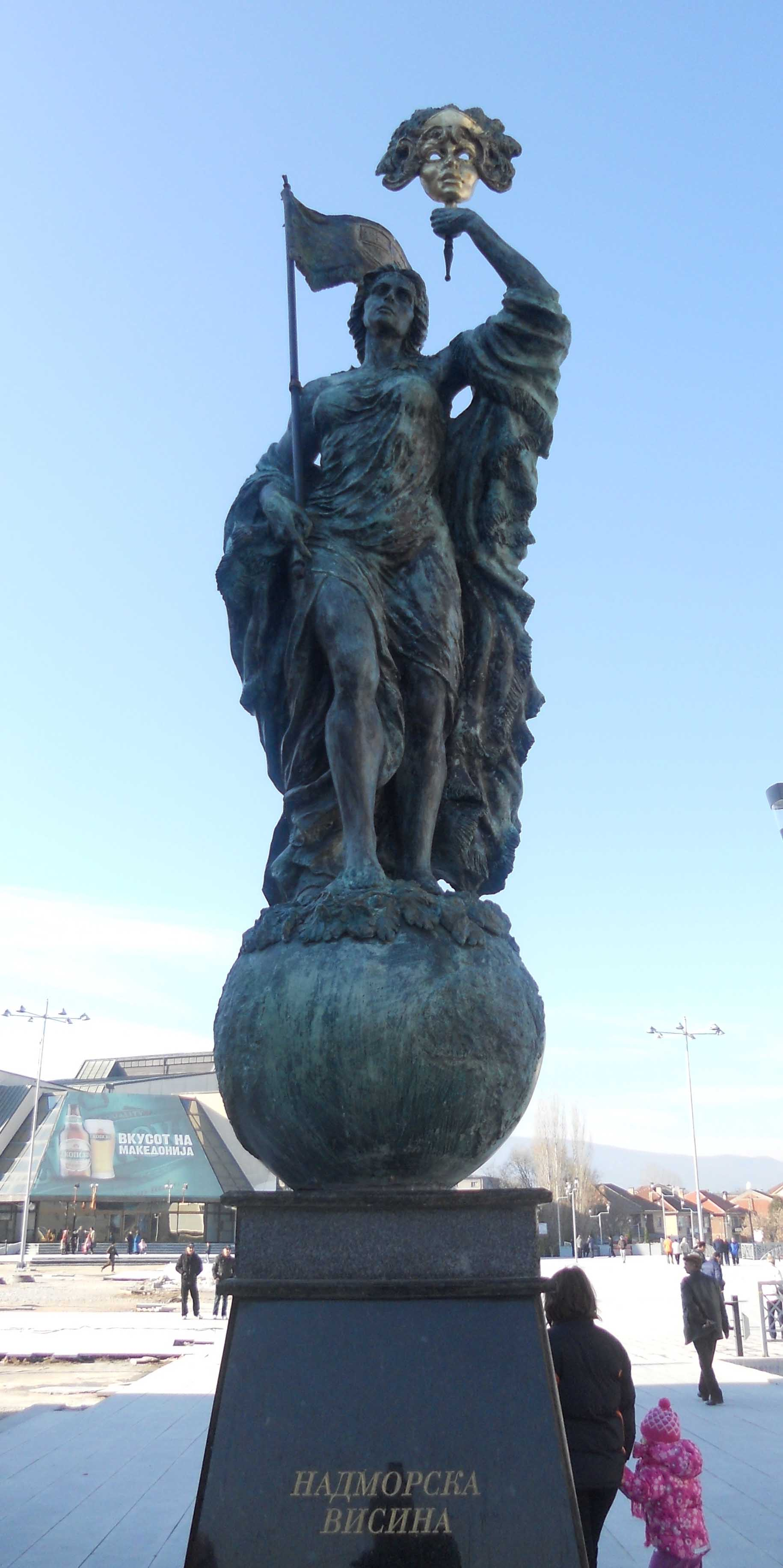 Споменик Струмичанка под маска